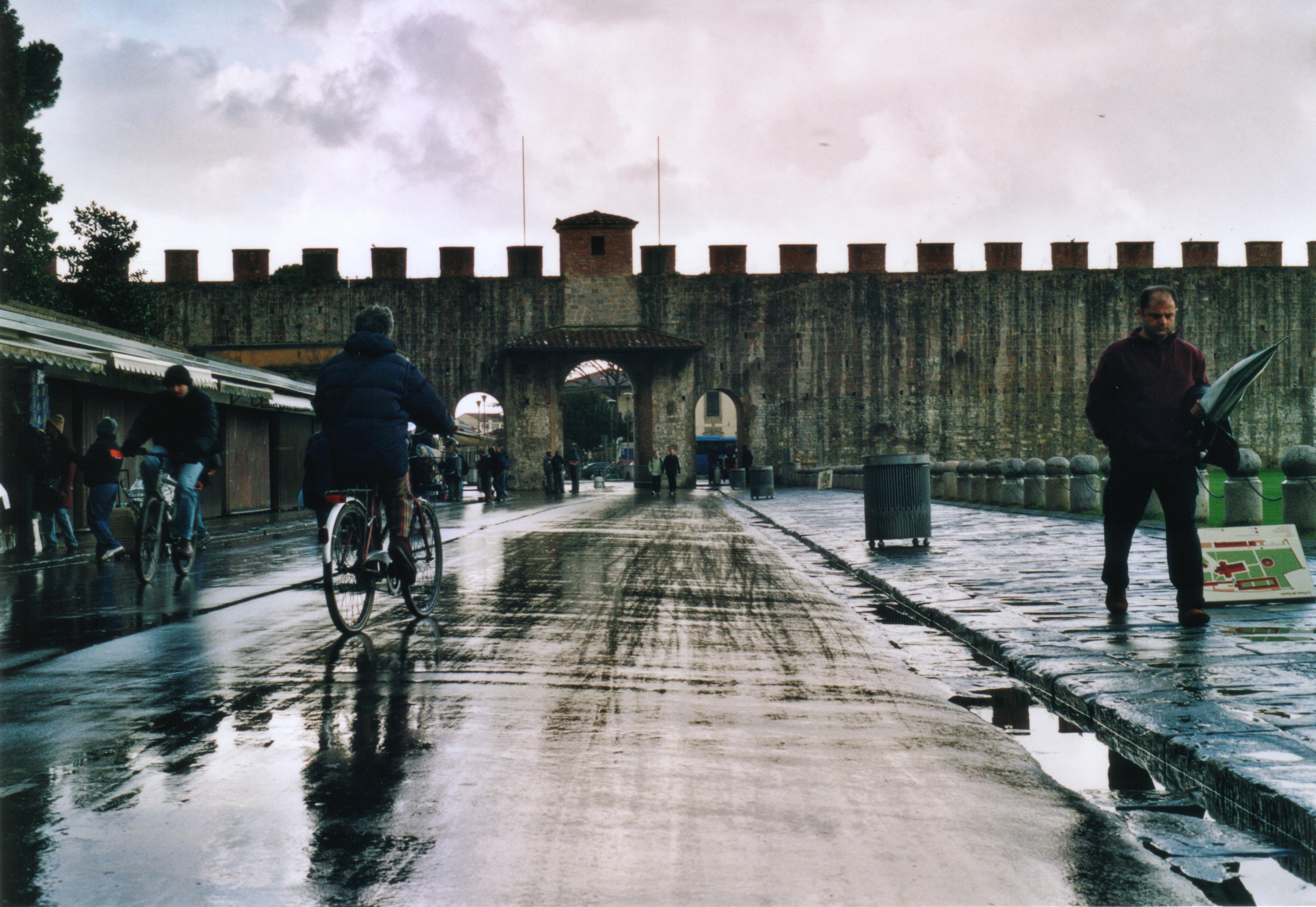 Pisa, Toscana, ItaliaScie nella pioggia